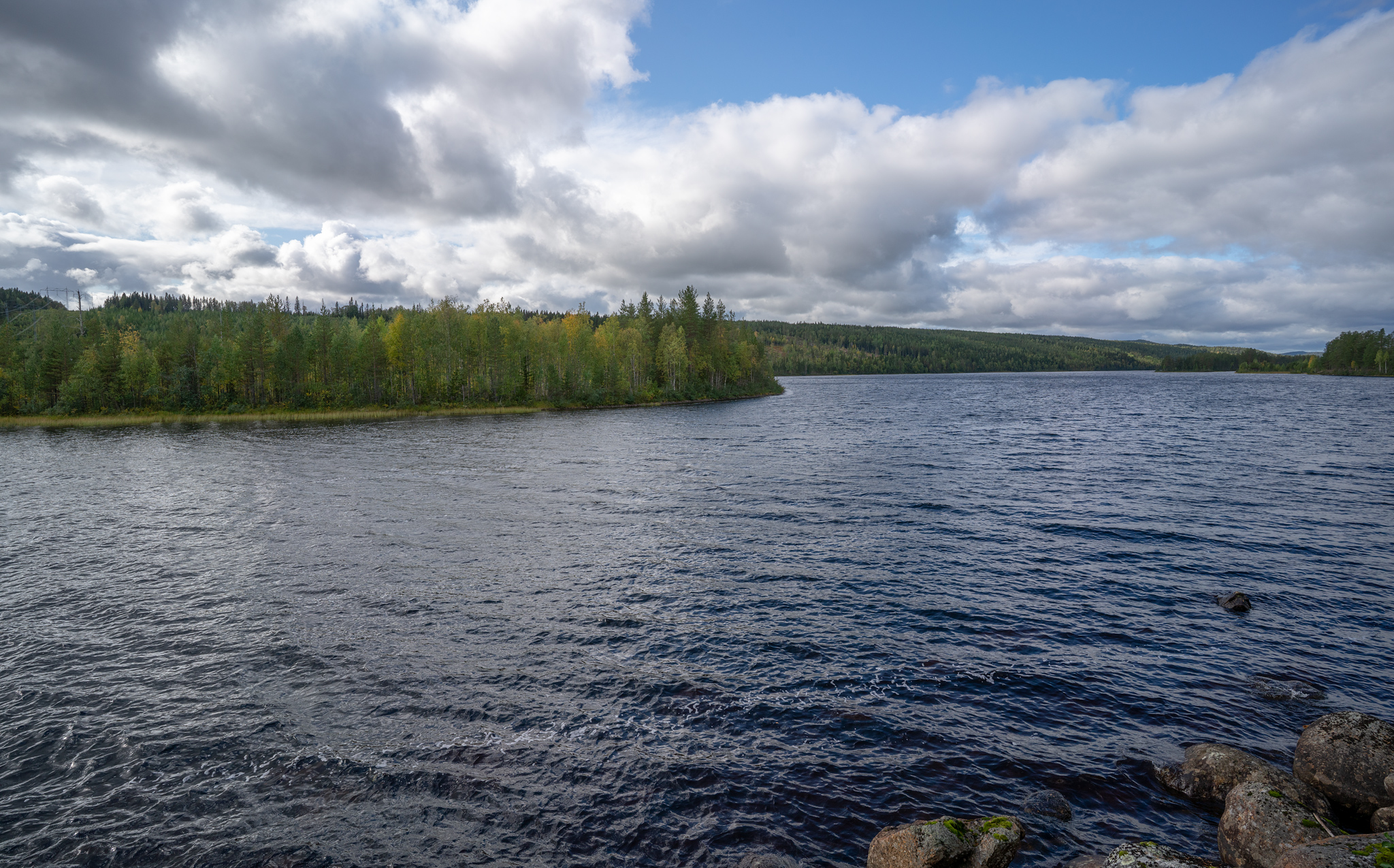 Vy mot väster från Lägstasjöns nordöstra strand.